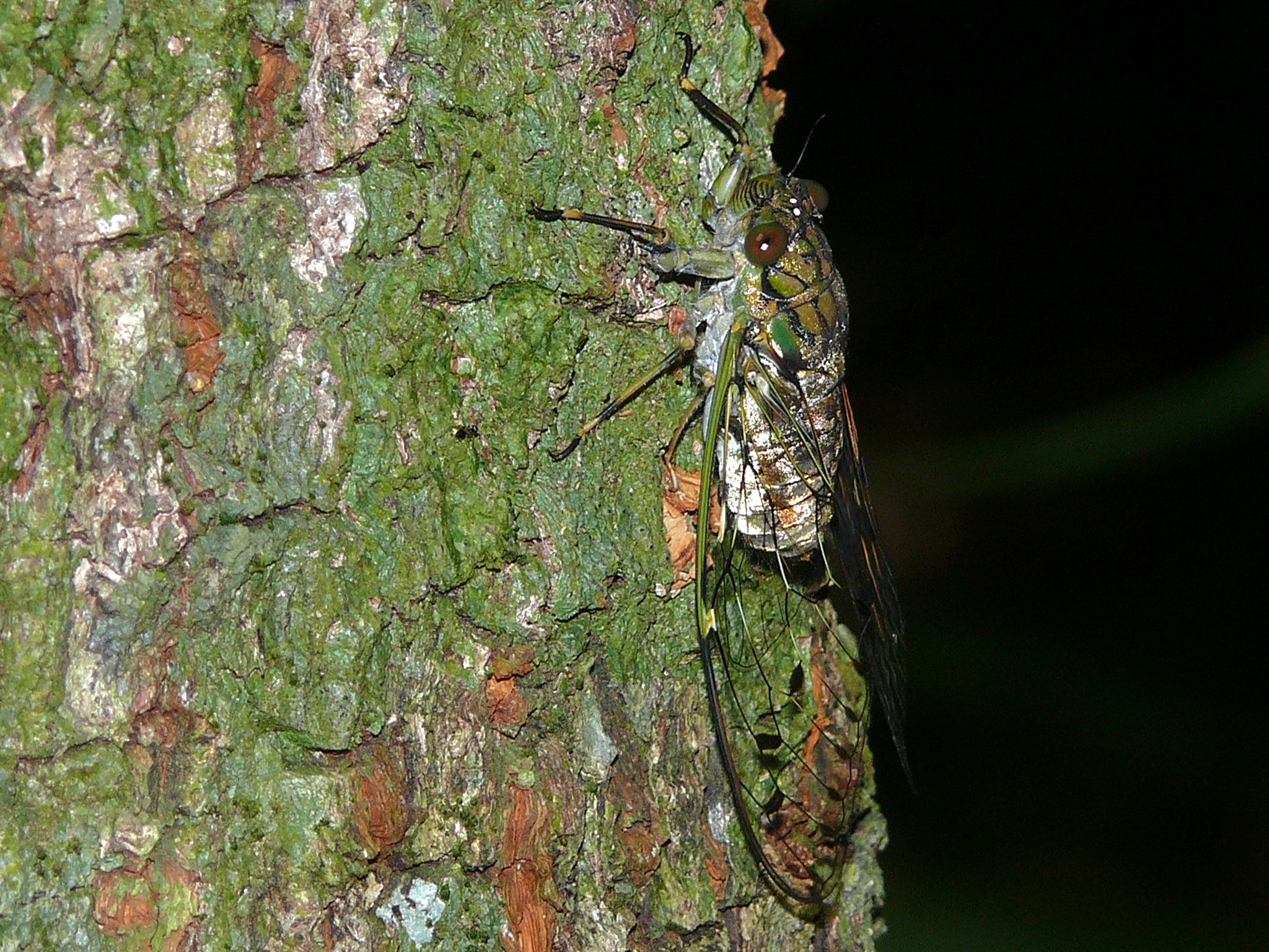 Similajau NP, Sarawak, MALAYSIA